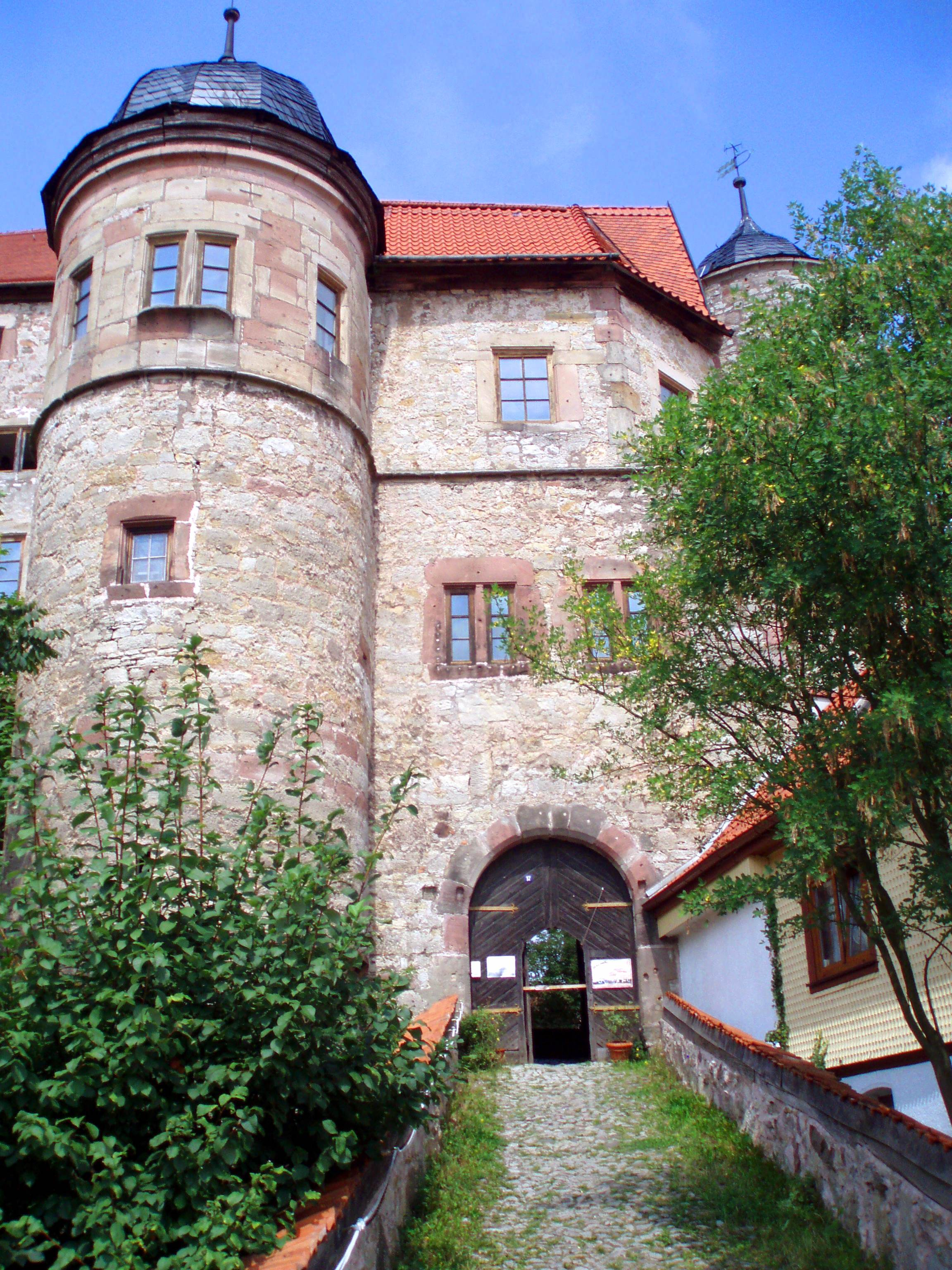 Schloss Kühndorf